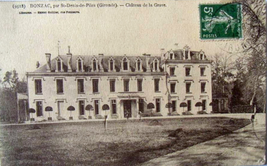 Bonzac on post-cards